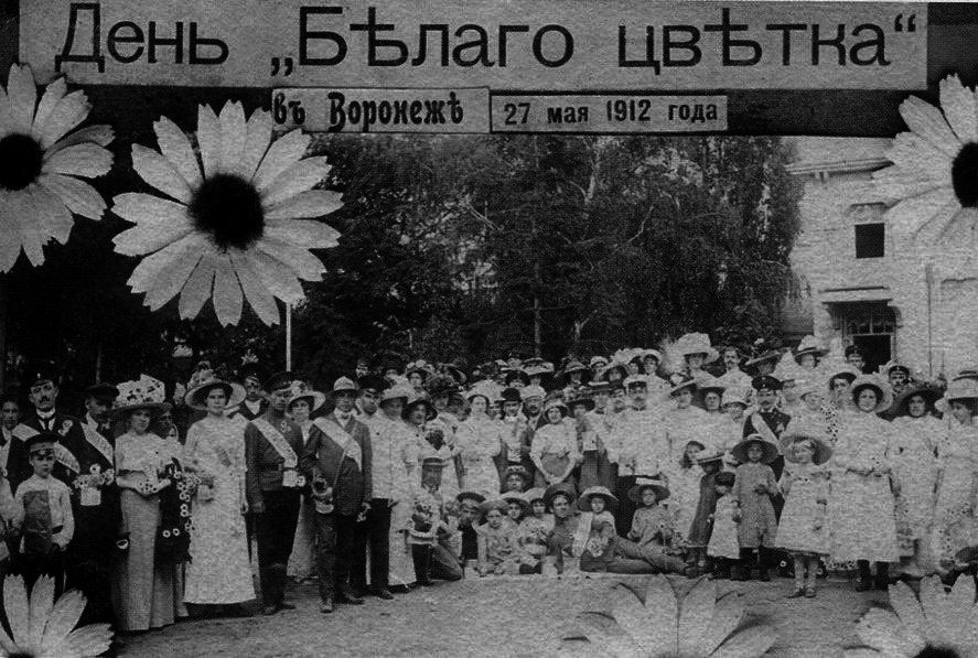 День Белого цветка в Российской империи, Воронеж